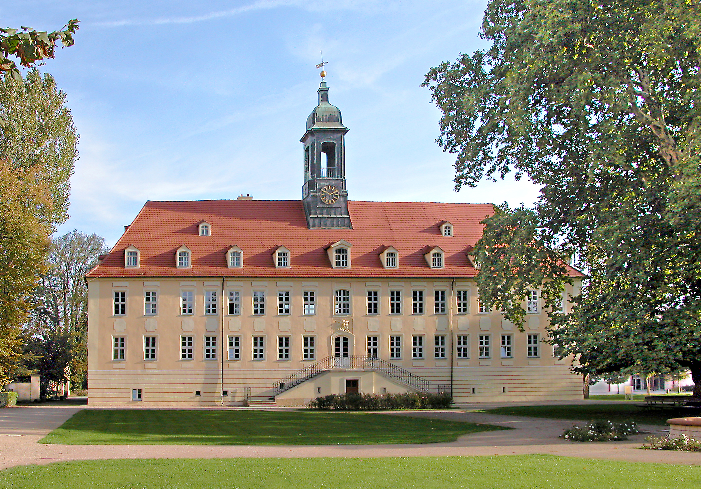 18.10.2006 04910 Elsterwerda, Schloßplatz (GMP: 51.454146,13.523496): Elsterschloß, barocke Dreiflügelanlage. 1288 wurde erstmals eine Burg zu Elsterwerda erwähnt. 1712 baut Woldemar Freiher von Löwendal die Burg zum Schloß um und übernahm sich dabei. 1727 ersteigerte es August der Starke, König von Polen und Kurfürst von Sachsen. Der Baumeister Johann Christoph Knöffel verwandelte den Adelssitz 1735 bis 1737 in ein kurfürstliches Jagd- und Lustschloß. 1815 fiel Elsterwerda an das Königreich Preußen. Aus dem im Schloß eingerichteten Lehrerseminar ging später eine Schule hervor, heute Gymnasium. Parkseite von Süden. [DSCN12117.TIF]20061018070DR.JPG(c)Blobelt